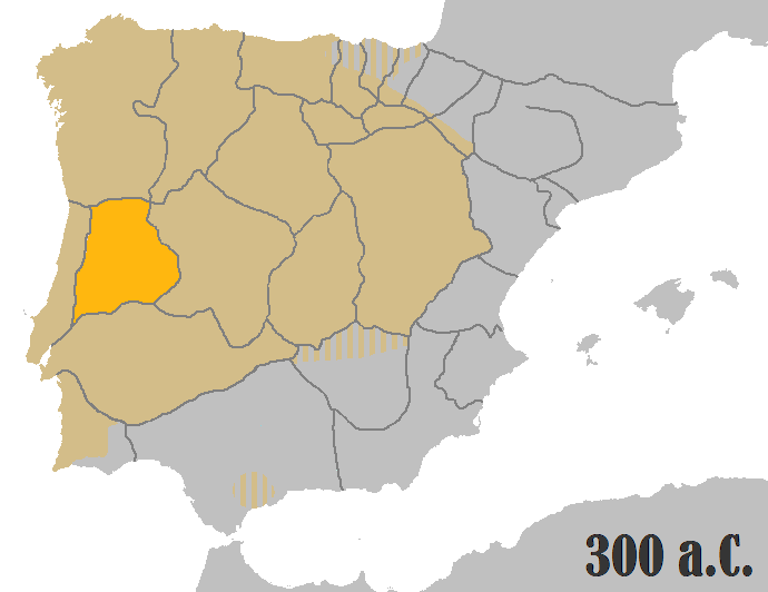 Idioma lusitano